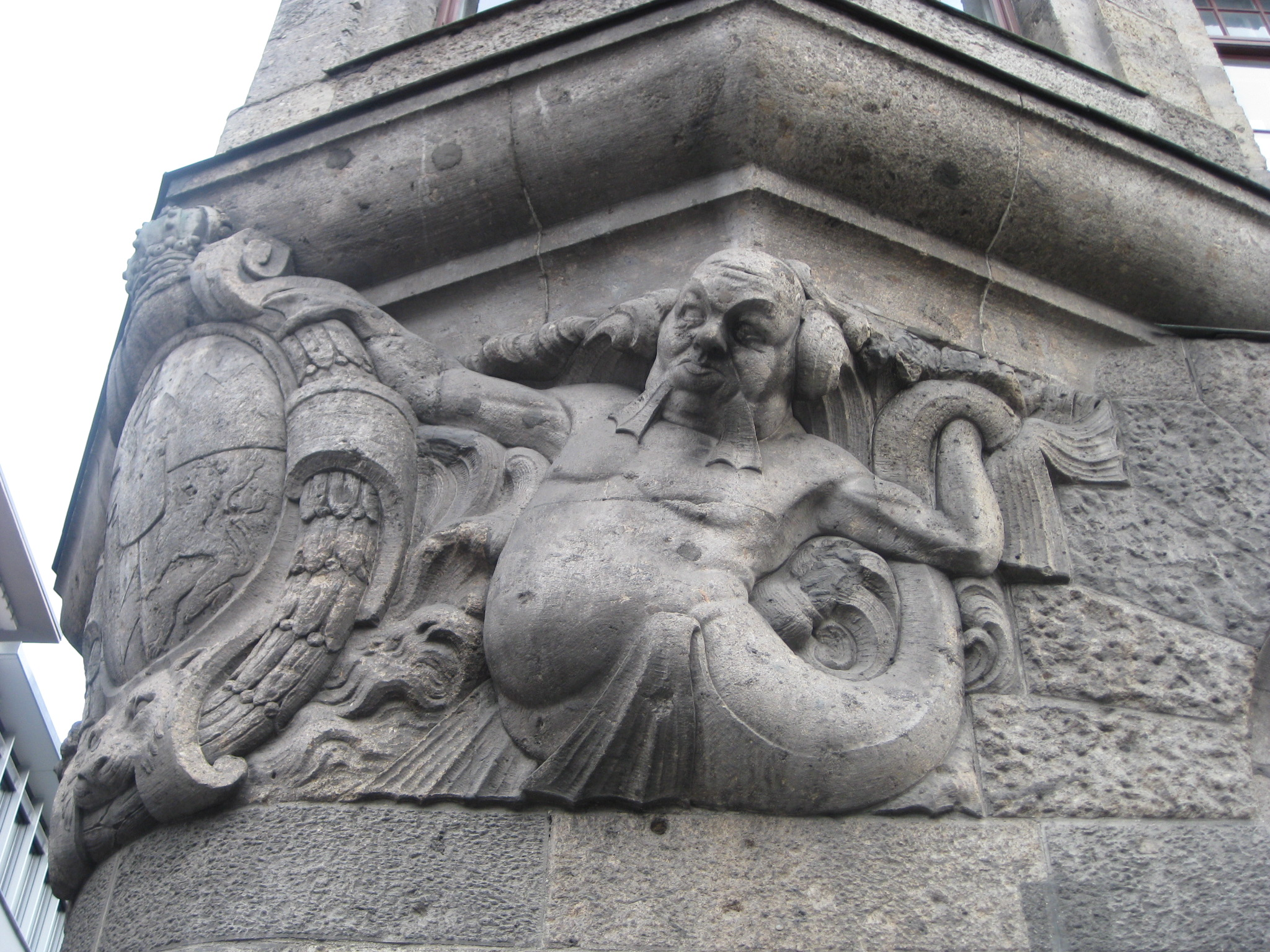 Detail an der Fassade des Postgebäudes (ehemals Oberpostdirektion) in Augsburg. Ecke Grottenau / Kleine Grottenau.